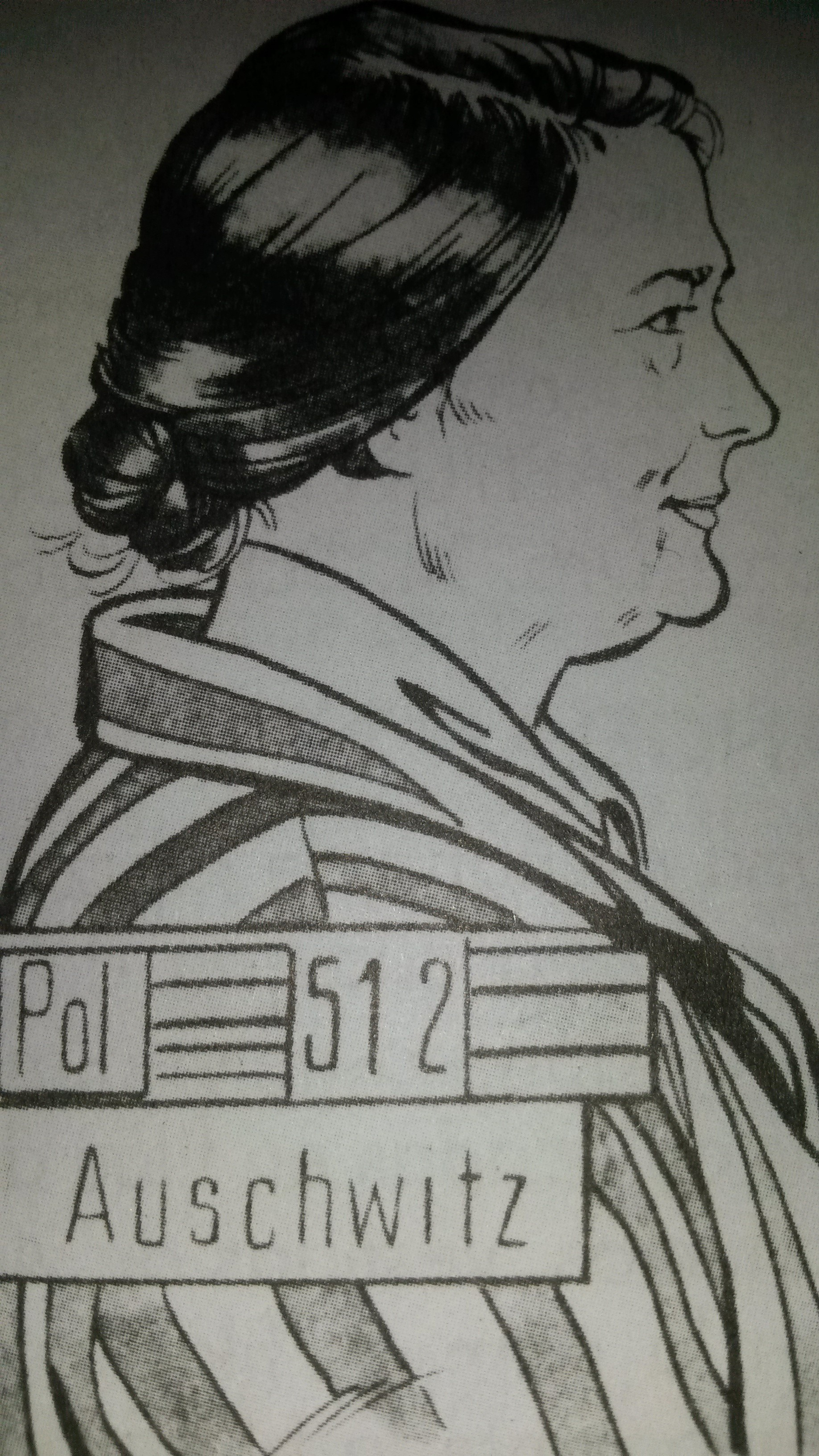 Dibujo de sor Ángela